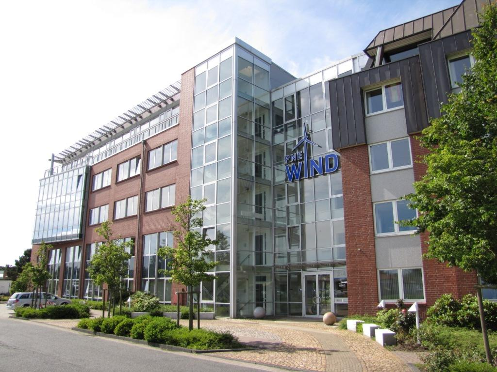 Unternehmenszentrale PNE WIND, Cuxhaven